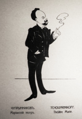 Русский оперный певец Митрофан Михайлович Чупрынников на карикатуре Поля Робера из альбома «Весь Петербург в карикатурах»